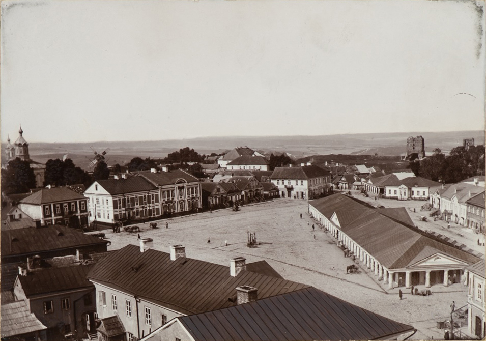 Беларуская (тарашкевіца): Наваградак (Navahradak), пляц Рынак (plac Rynak) з боку вуліцы Слонімскай (vulica Słonimskaja). Палац Радзівілаў (Radzivił)